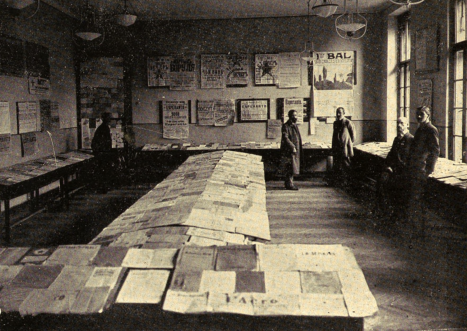 La ekspozicio de la Universala Kongreso 1912 en Krakovo